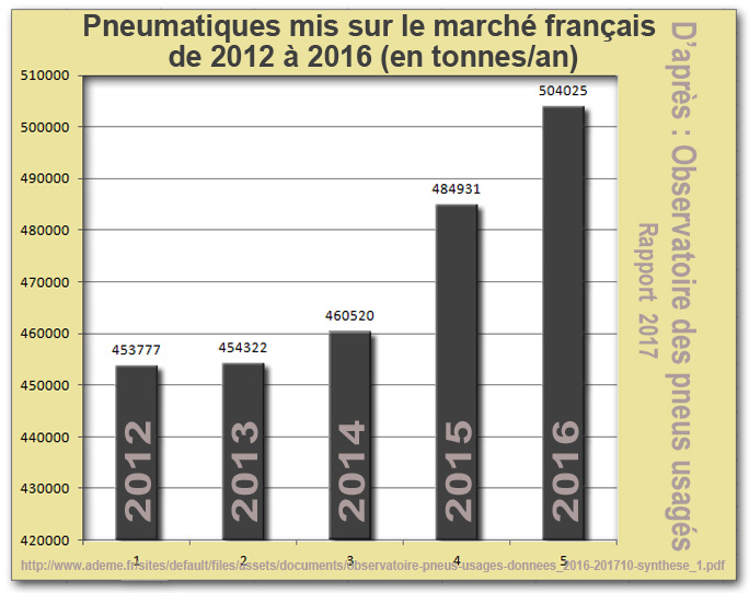 Pneus neufs mis sur le marché français 2012 2016, à partir des données du rapport 2017 du Rapport Annuel de l’Observatoire des Pneus Usagés, rédigé par Katherine SALÈS, Philippe KUCH, Otto KERN. ADEME, Karine FILMON. Deloitte Développement Durable, Octobre 2017. disponible en ligne sur